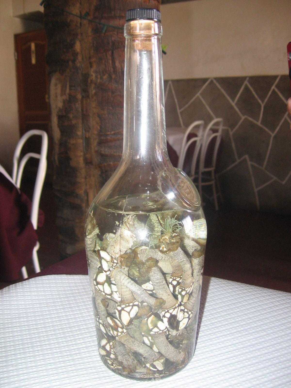 Grogue com percebes, ilha de Santiago, Cabo Verde